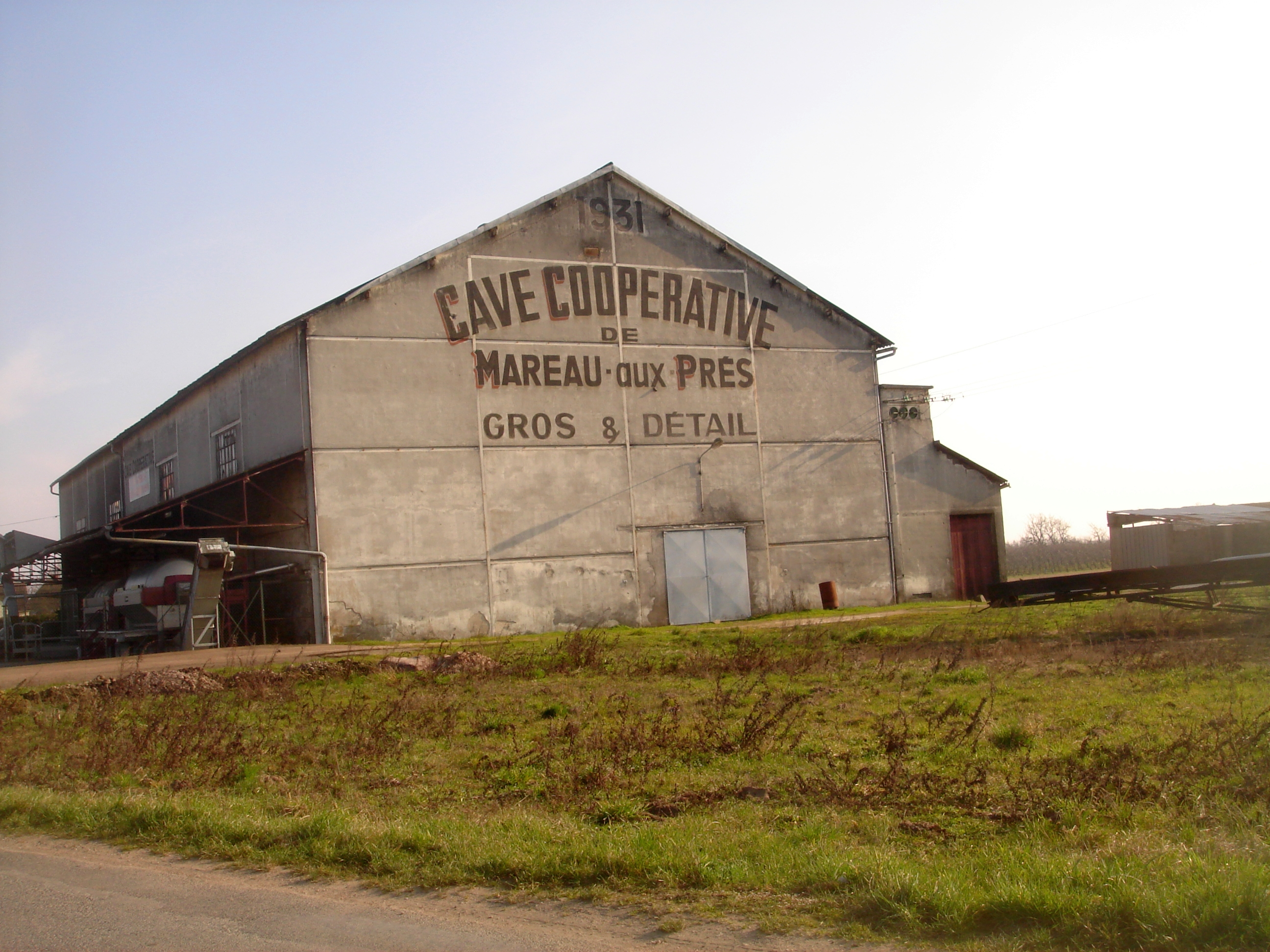 Cave coopérative des vignerons de la Grand'maison, appellation d'origine contrôlée d'Orléans et d'Orléans-cléry, Mareau-aux-Prés, Loiret, Centre, France